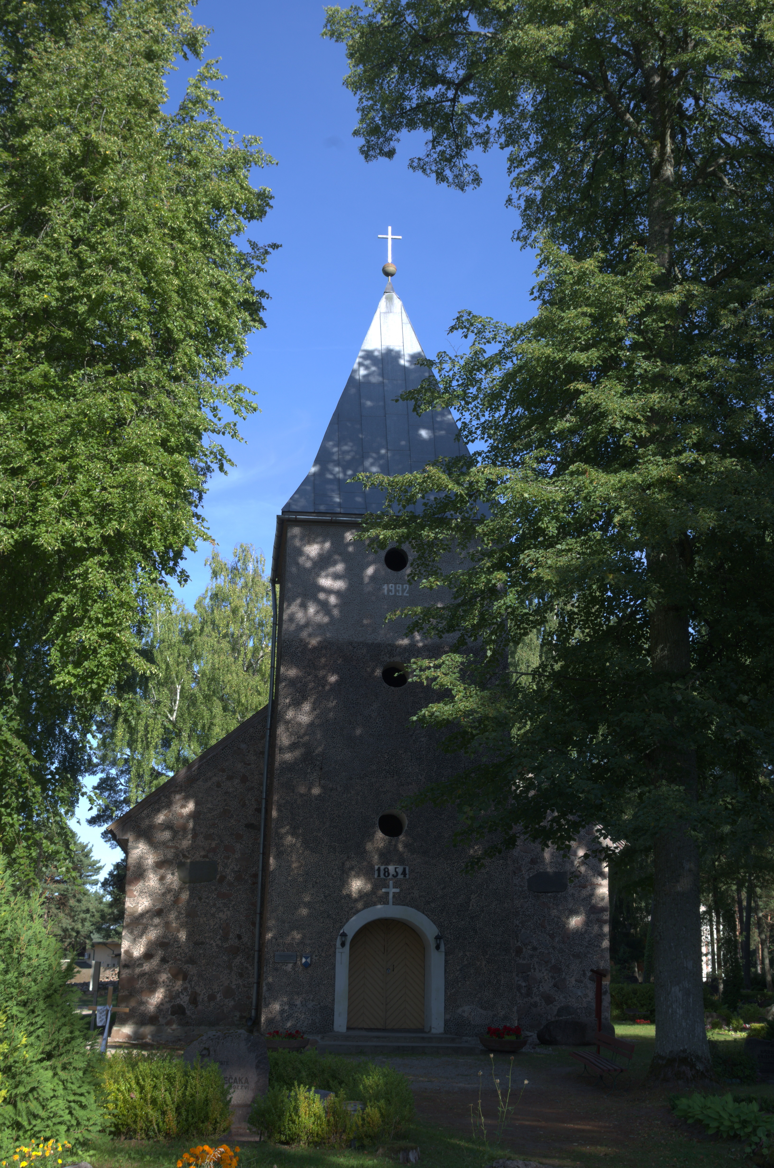 Rojas evaņģēliski luteriskā baznīca